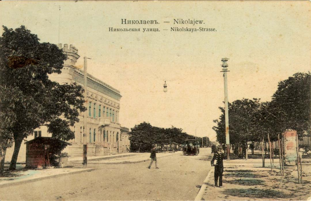 „Nikolajew. Nikolskaya-Strasse.“